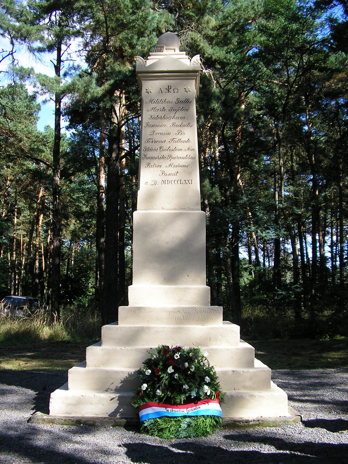 Sogenanntes "Franzosendenkmal" in Altes Lager von 1871, 2008 saniert, gilt als Gründungsdokument des Ortes.